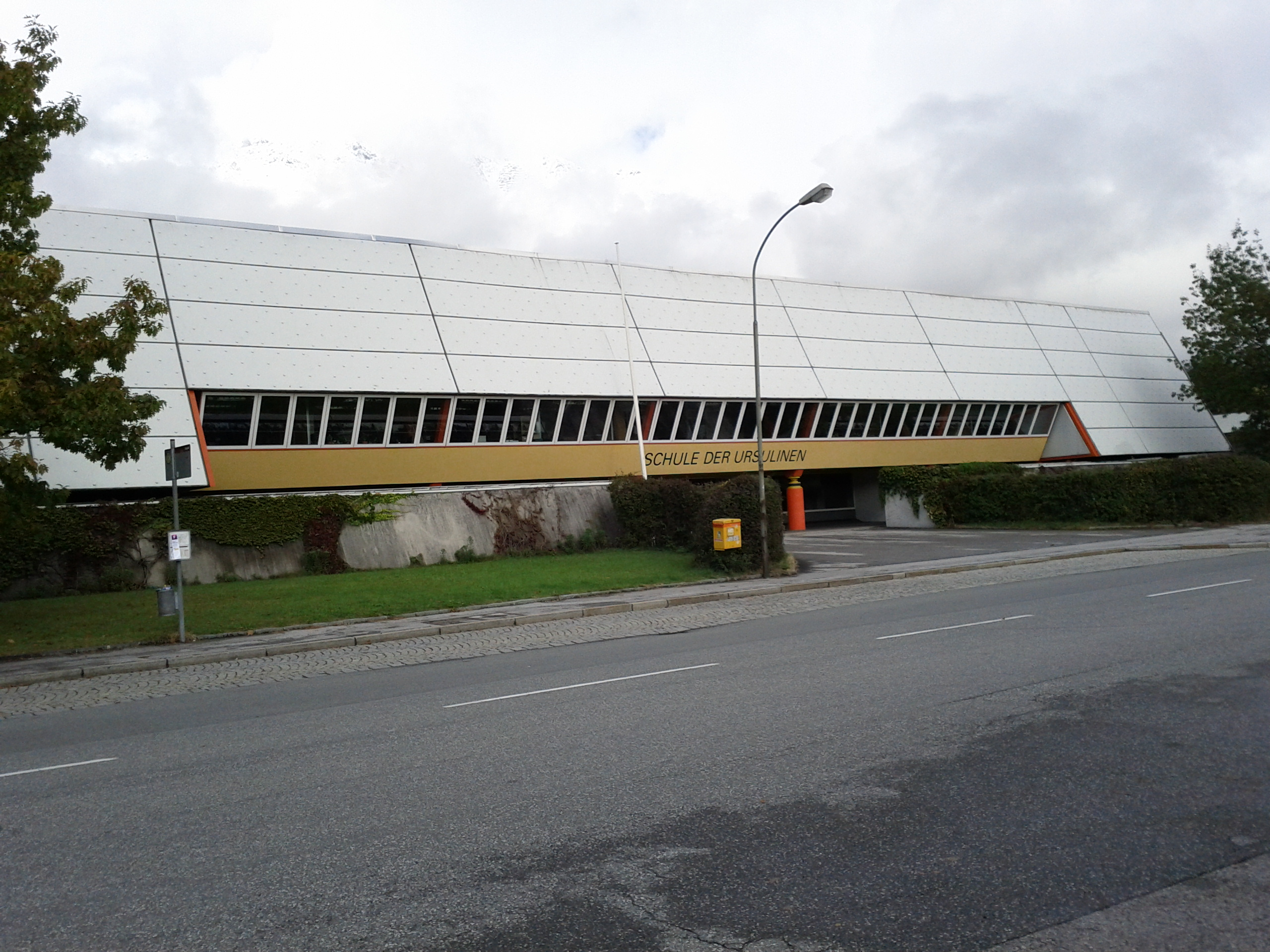 Schul- und Klosterkomplex der Ursulinen